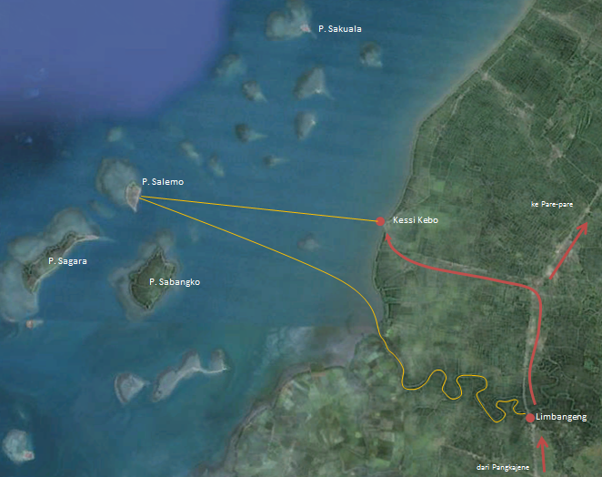 Peta Pulau Salemo